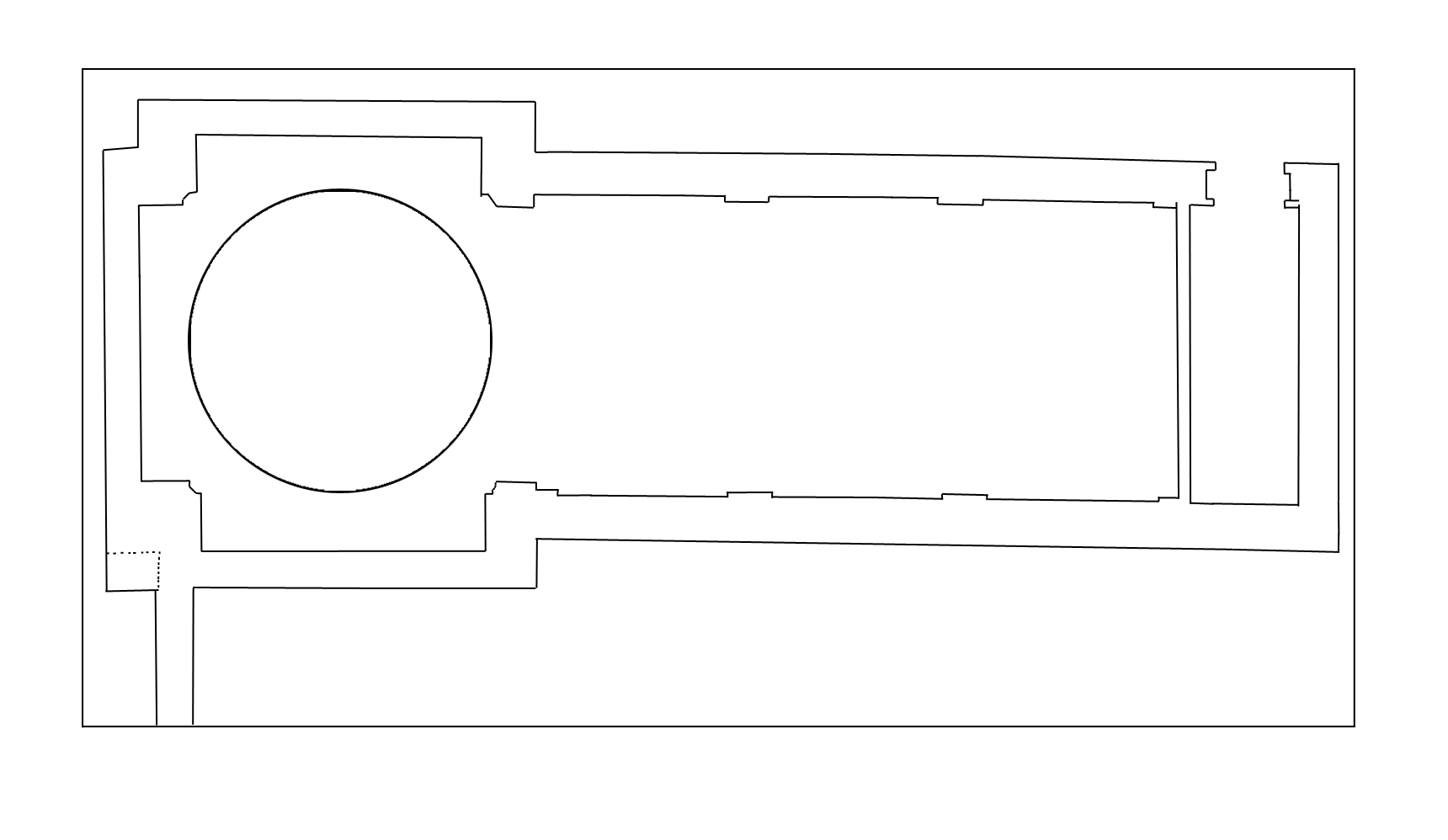 Dibujo de la planta de la capilla de la Venerable Orden Tercera en el desaparecido convento de San Francisco de Valladolid (España), realizado por el arquitecto Juan de Répide en 1654. Se conserva en el AHPV.